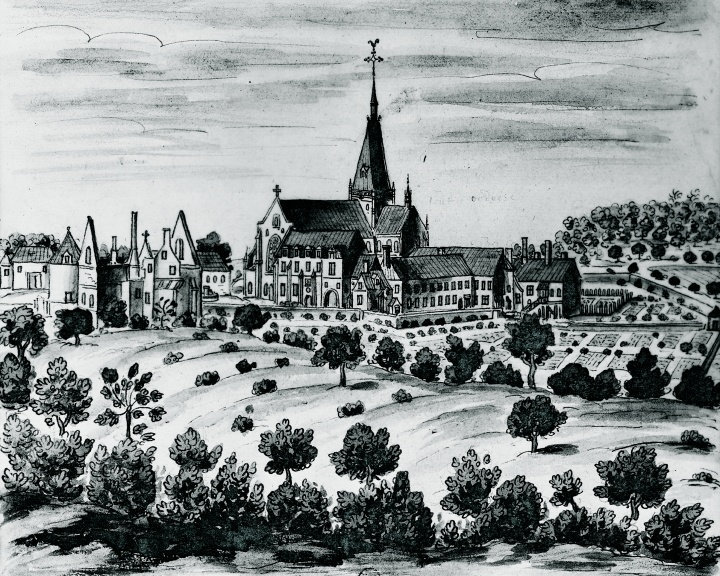 L'abbaye de Fontaine Daniel en 1695, par Louis Boudan.